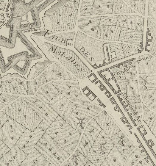 Carte de la route d'Arras future rue d'Arras à Lille-Moulins en 1820